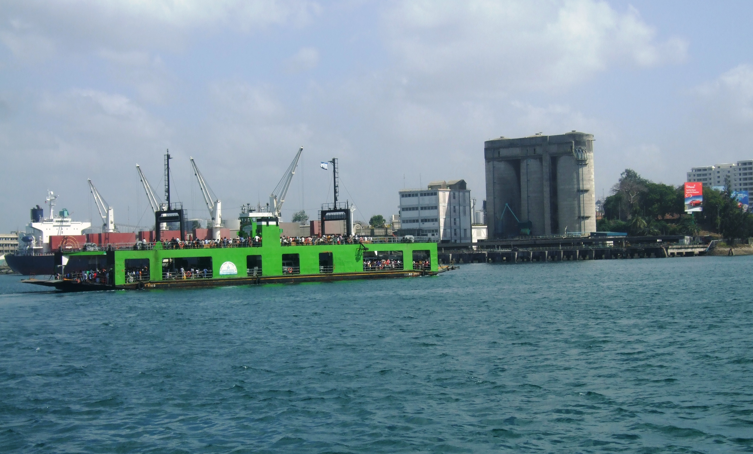 Crossing the Kilindini Harbour, Mombasa Kenya